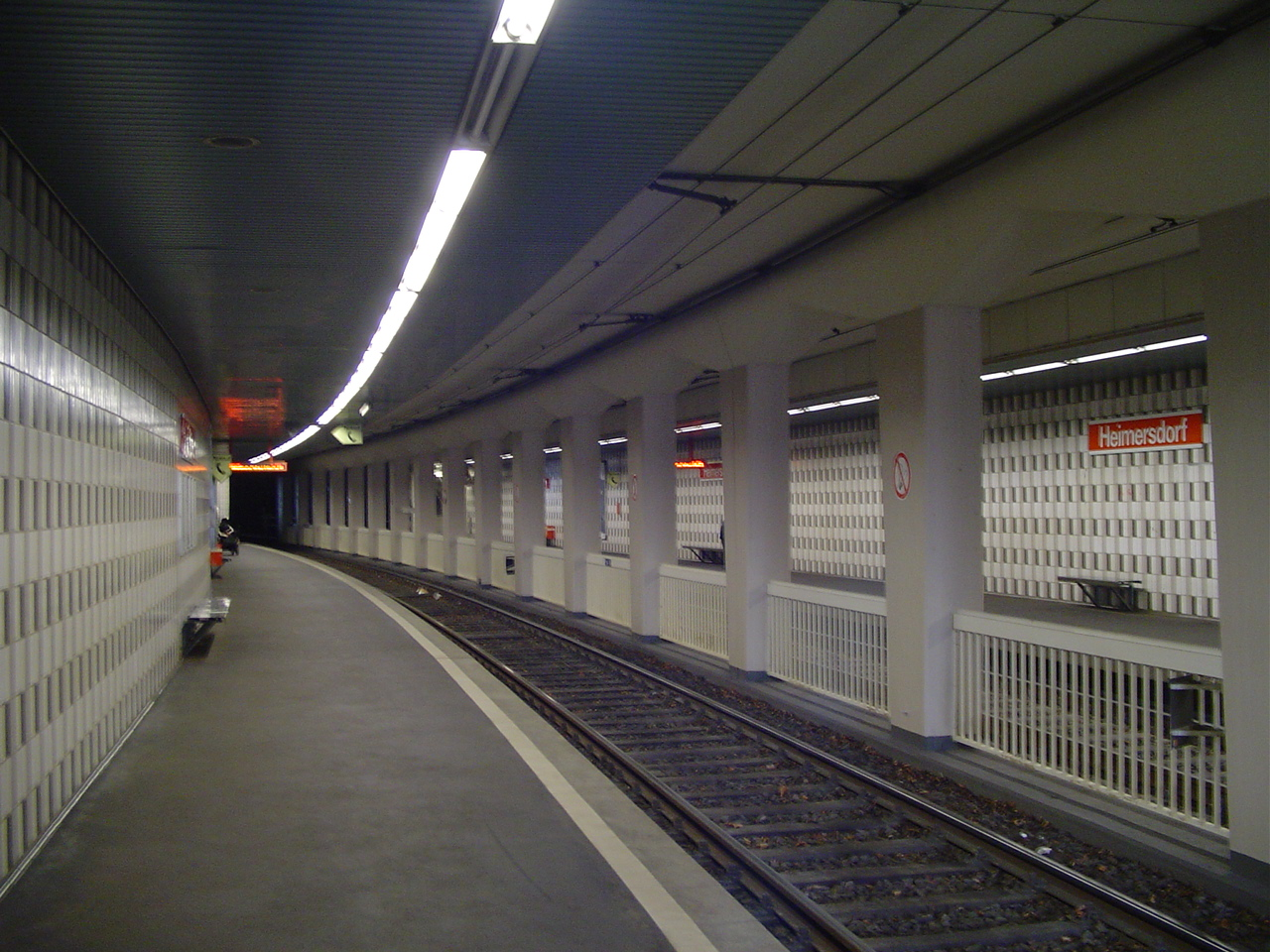 Stadtbahn Köln, Haltestelle Heimersdorf